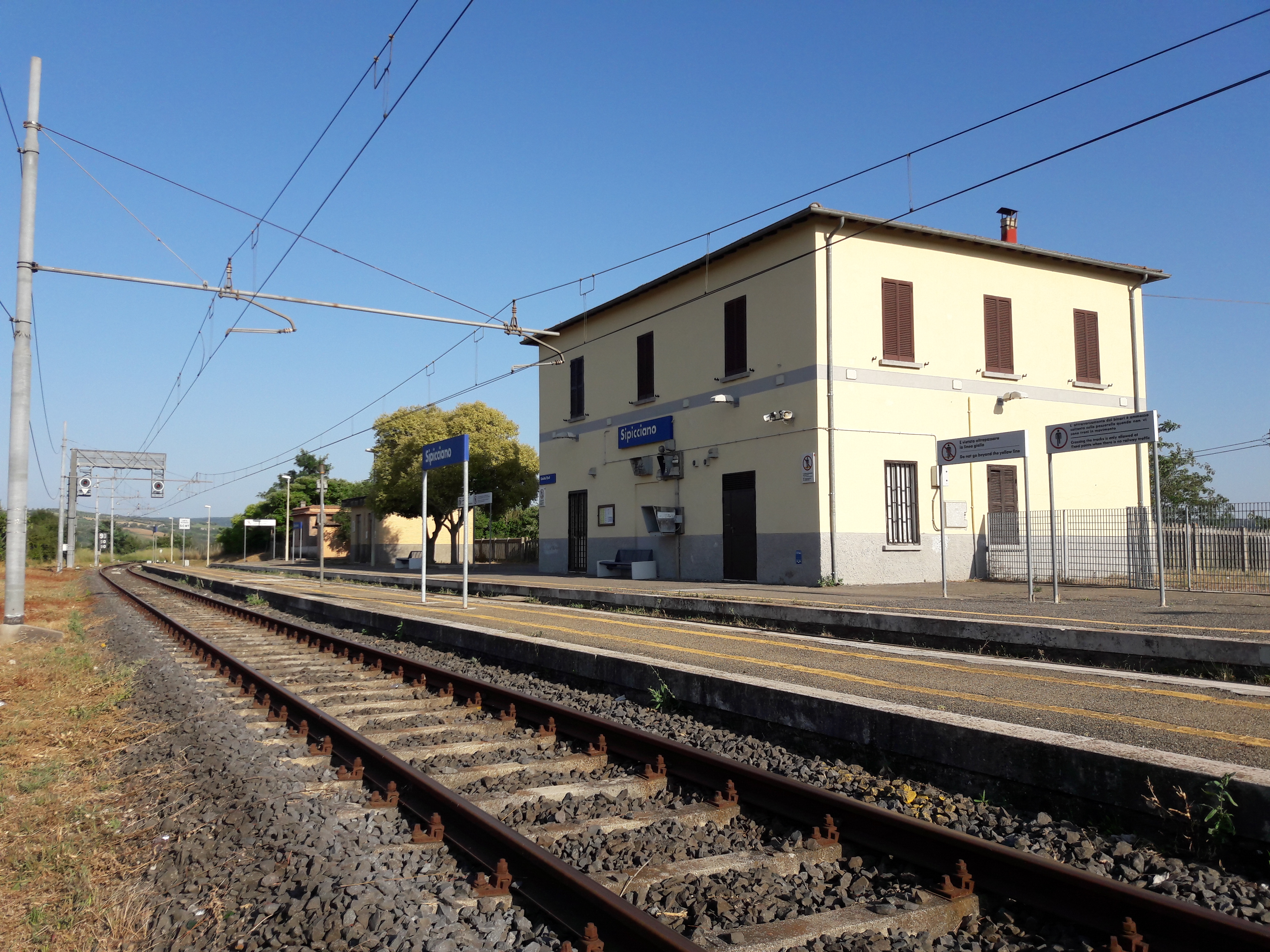 Stazione lato binari, in direzione Orte (Attigliano-Bomarzo).